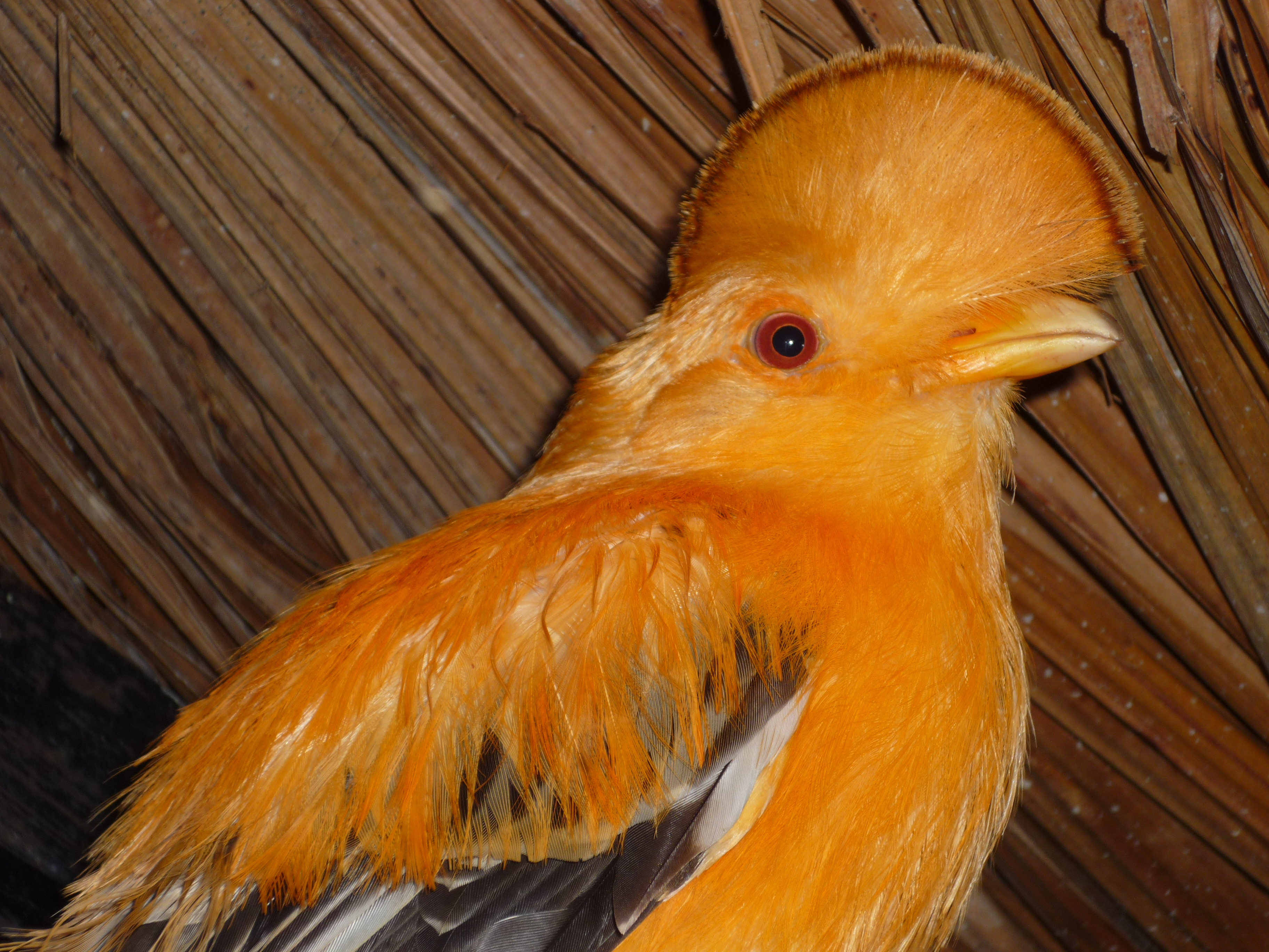 Parque Nacional Canaima Sector Occidental